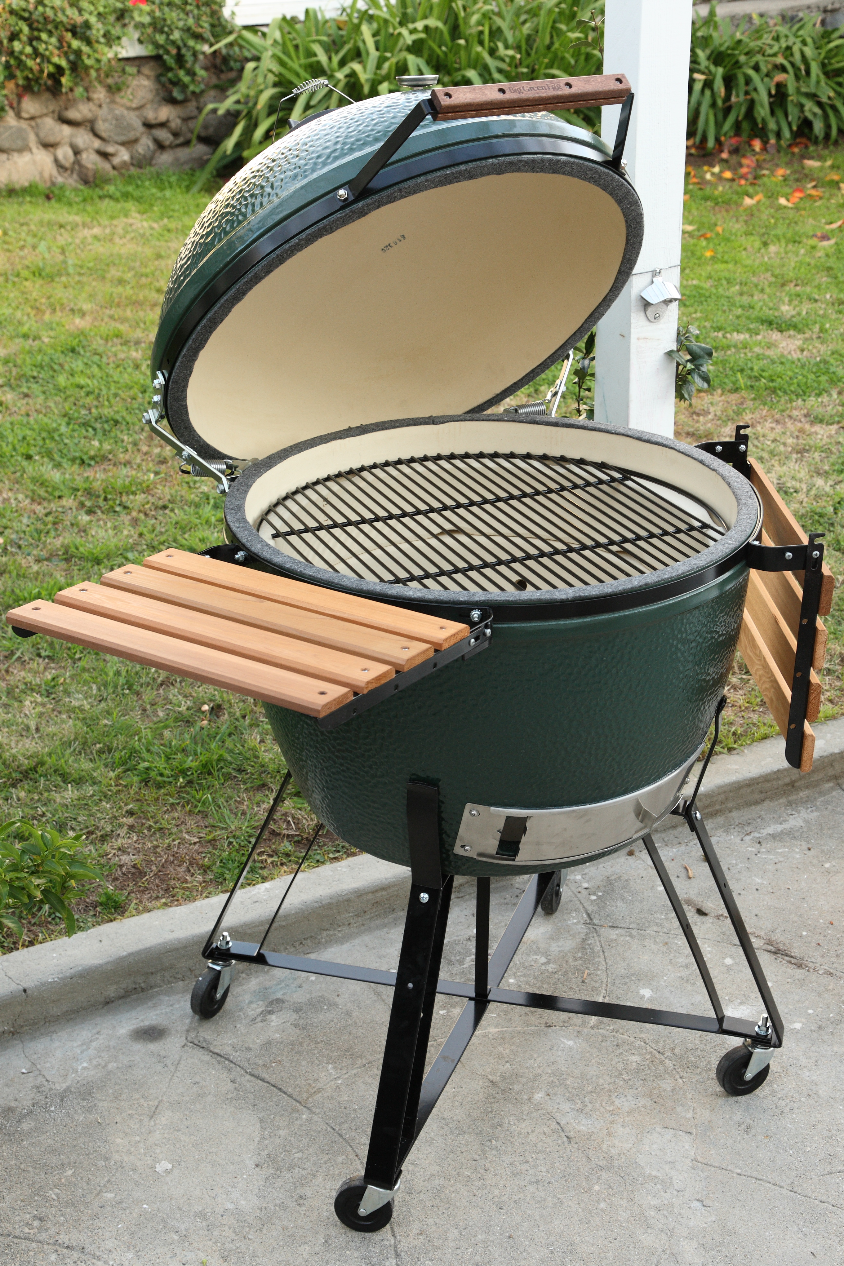 Big Green Egg smoker/grill/bbq (XL size)